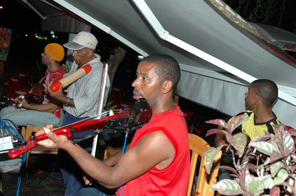 En typisk kapverdiansk musikgroup. Bilden tagen av Henryk Kotowski i november 2005